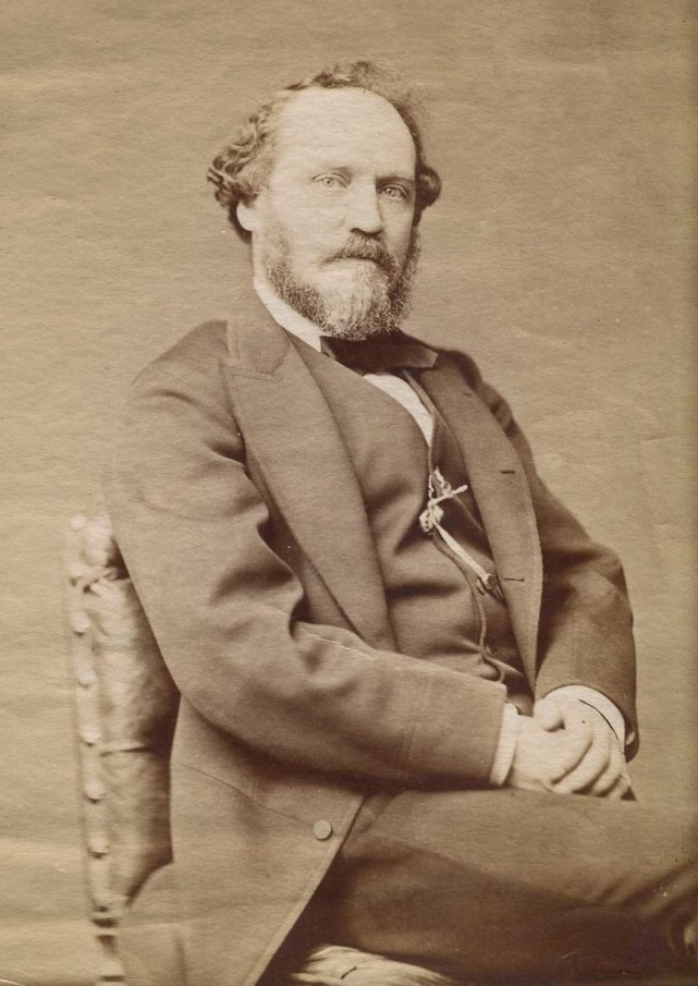 Louis Ernest Hamel, vers 1870.